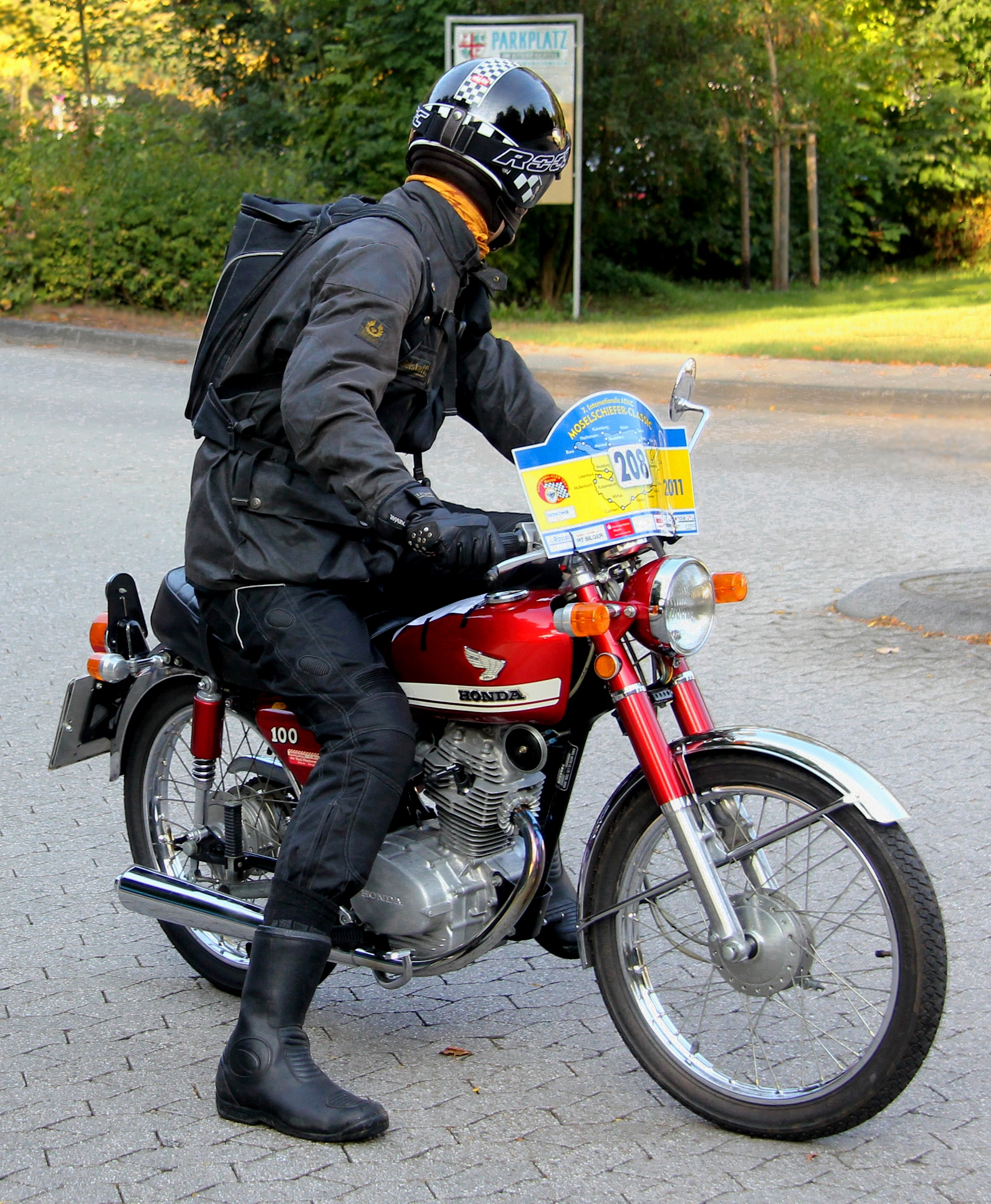 Honda CB 100, Baujahr 1974, bei der Moselschiefer-Classik in Mayen